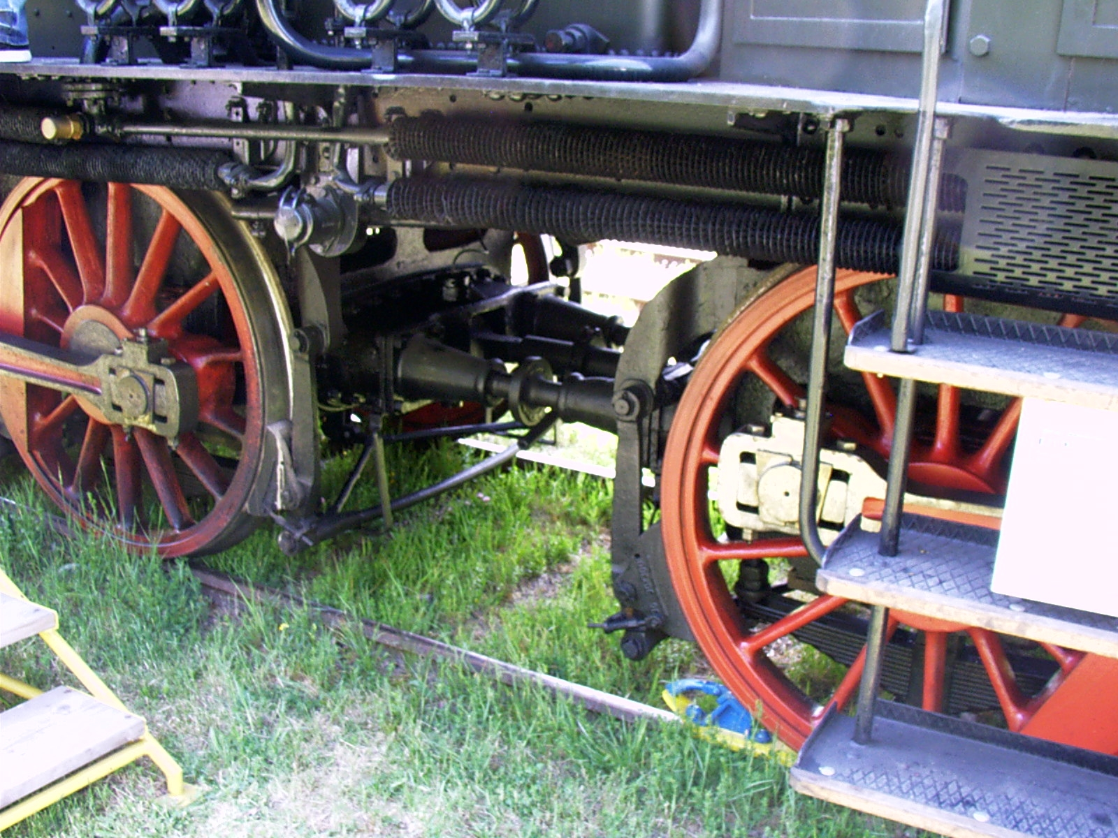 Kupplung zwischen den Triebdrehgestellen der E71 19